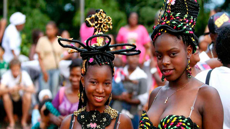 Afrocolombianos, indígenas.